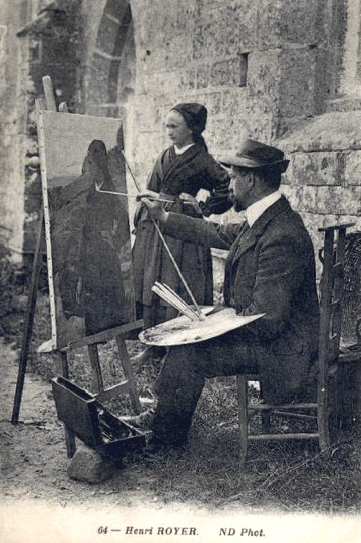 Le peintre Henri Royer peignant en extérieur.